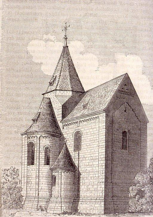 Strassburg. S. Stephan. Ansicht der Osttheile. 1876. Bibliothèque nationale et universitaire de Strasbourg